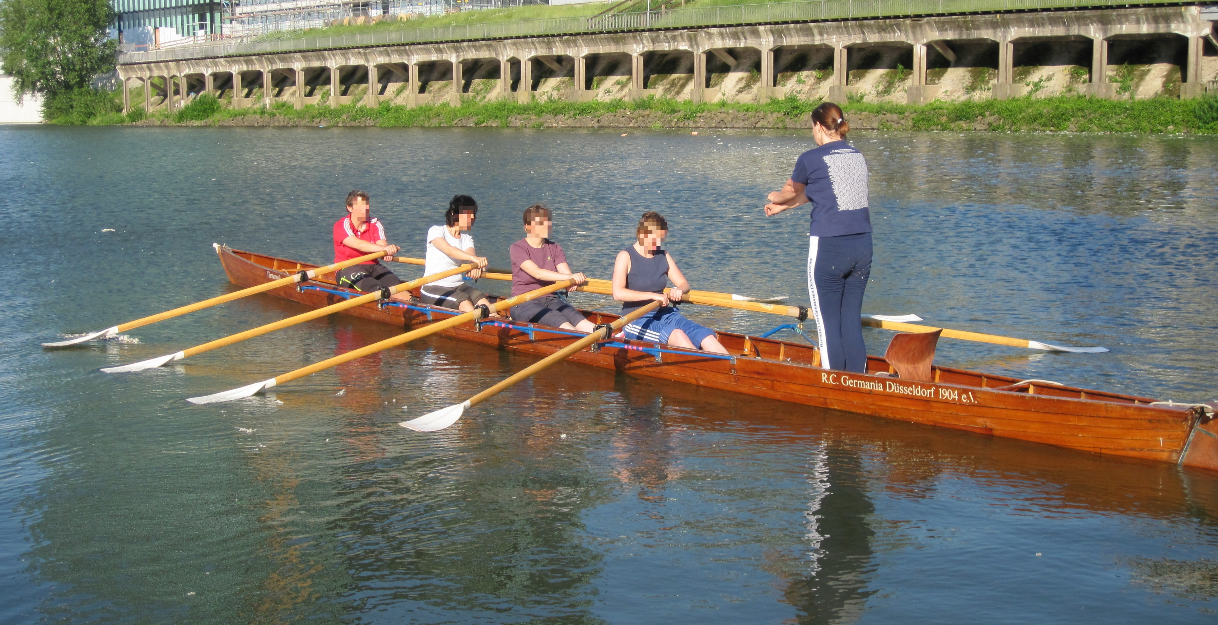 Gig-Ruderboot (Vierer mit Steuermann) bei der Ruderausbildung im Düsseldorfer Hafen